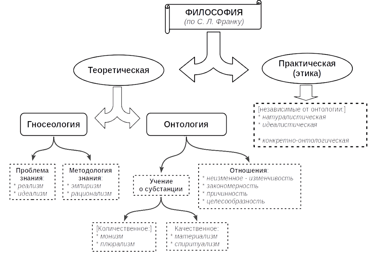 Схема философии. По кн.: С. Л. Франк. Введение в философию в сжатом изложении. СПб, «Академия», 1922.